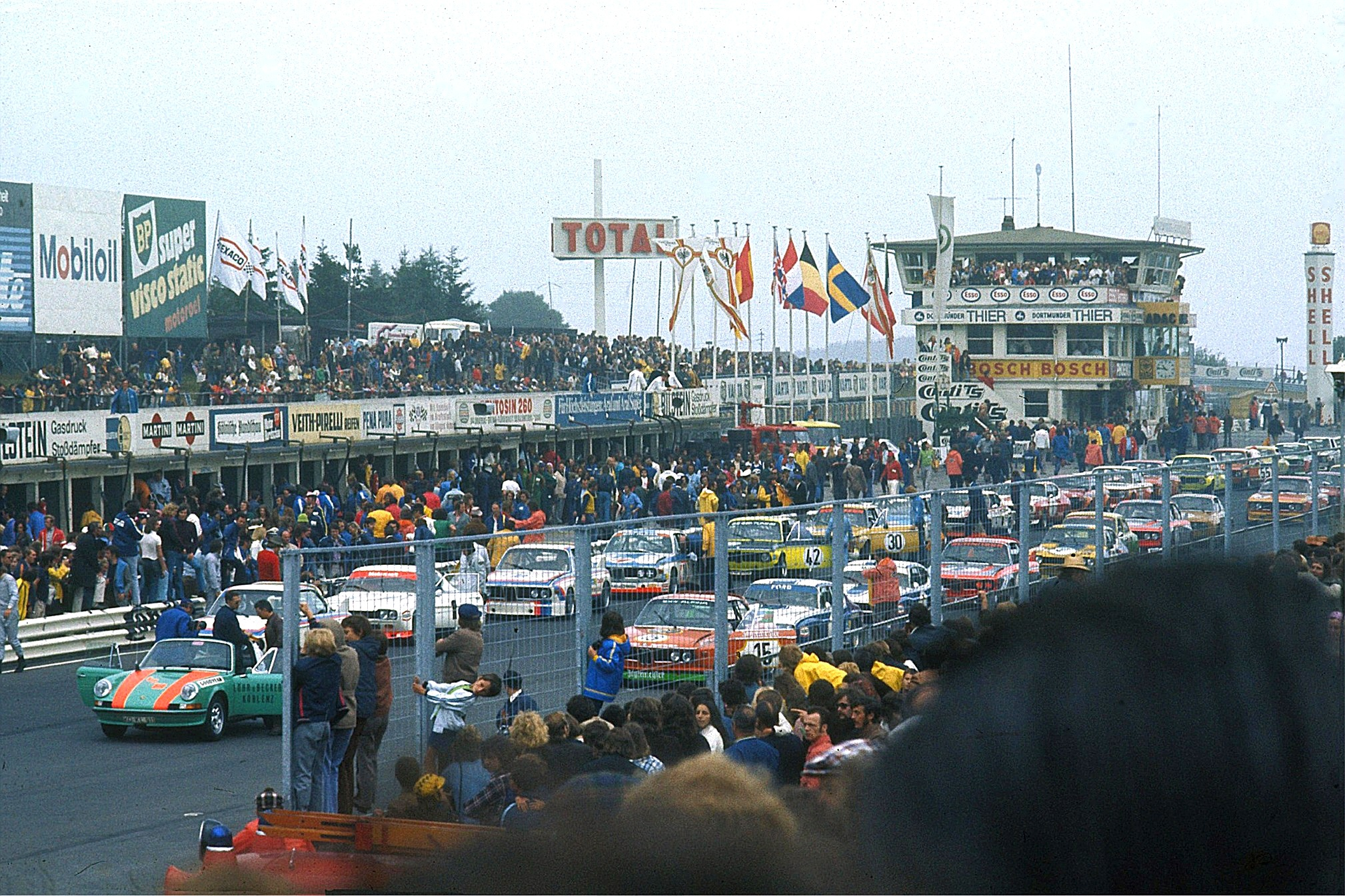 Start zum 6-Stunden-Rennen auf dem Nürburgring, 10:47 Uhr